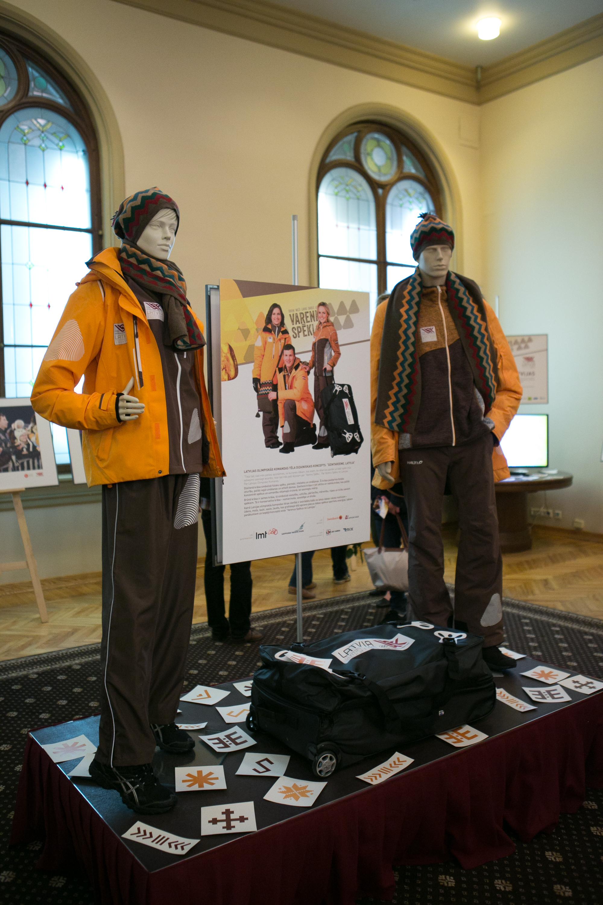 Latvijas tērpi 2014. gada Olimpiskajās spēlēs